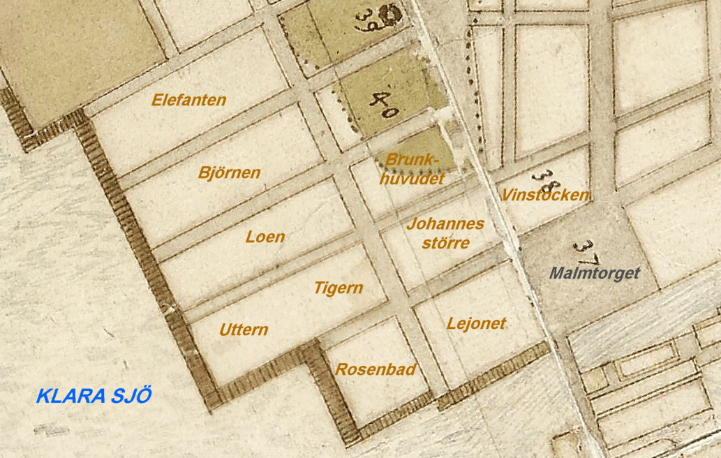 Del av dansk 1640-talskarta över Stockholm visande nedre Norrmalm med nuvarande kvartersnamn.